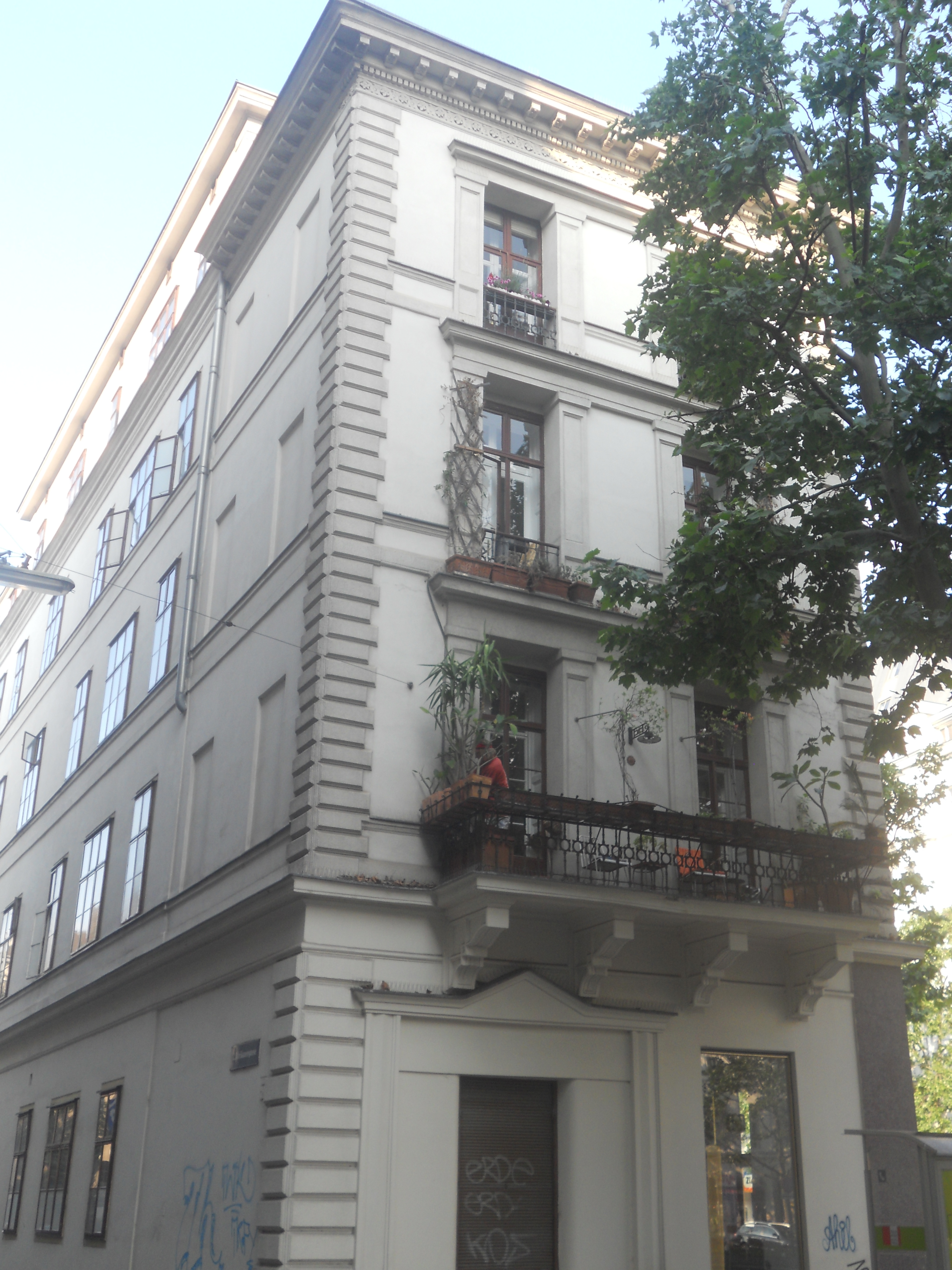 Das Haus Afrikanergasse 2 in Wien